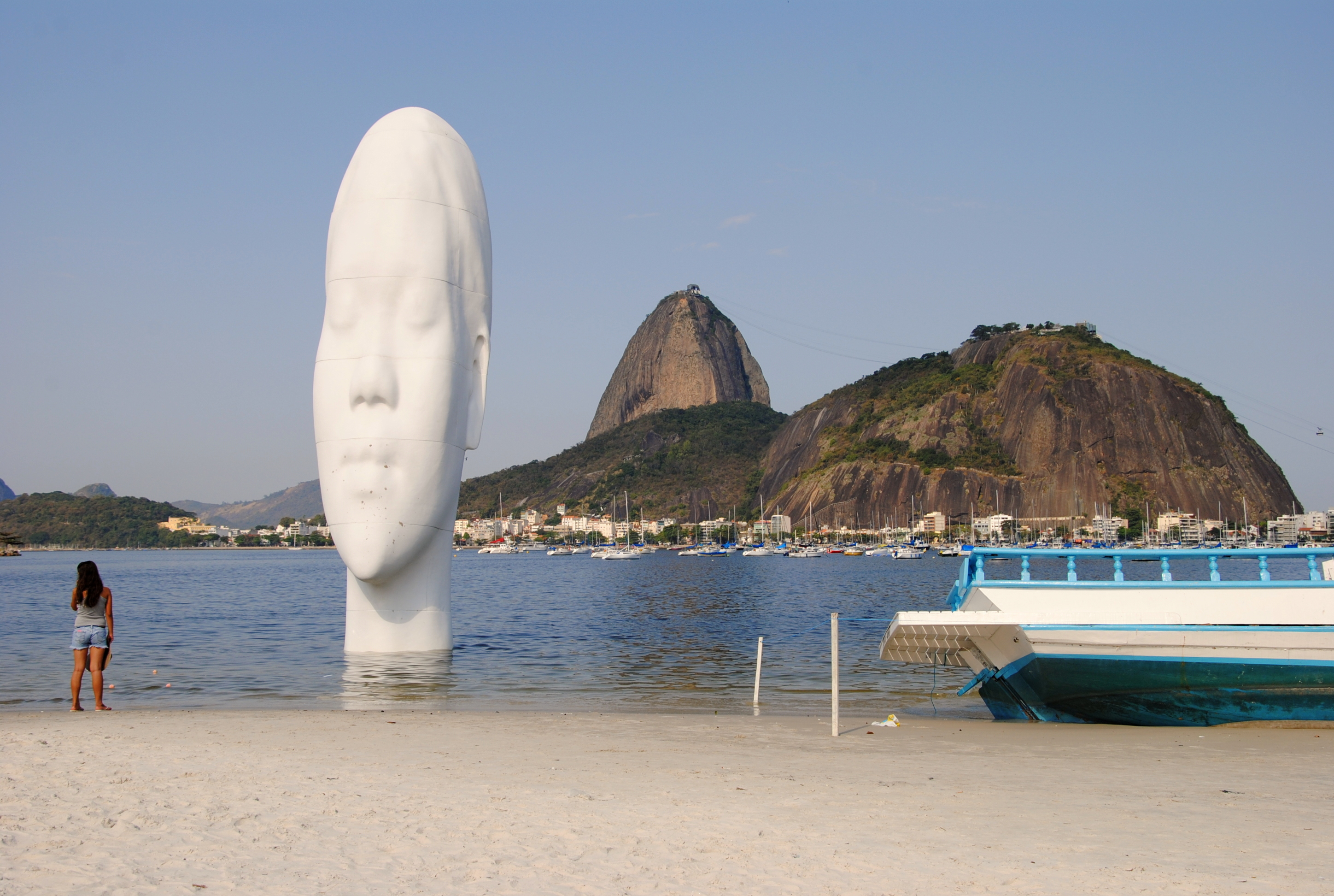 Praia de Botafogo, Rio de Janeiro. OiR2012